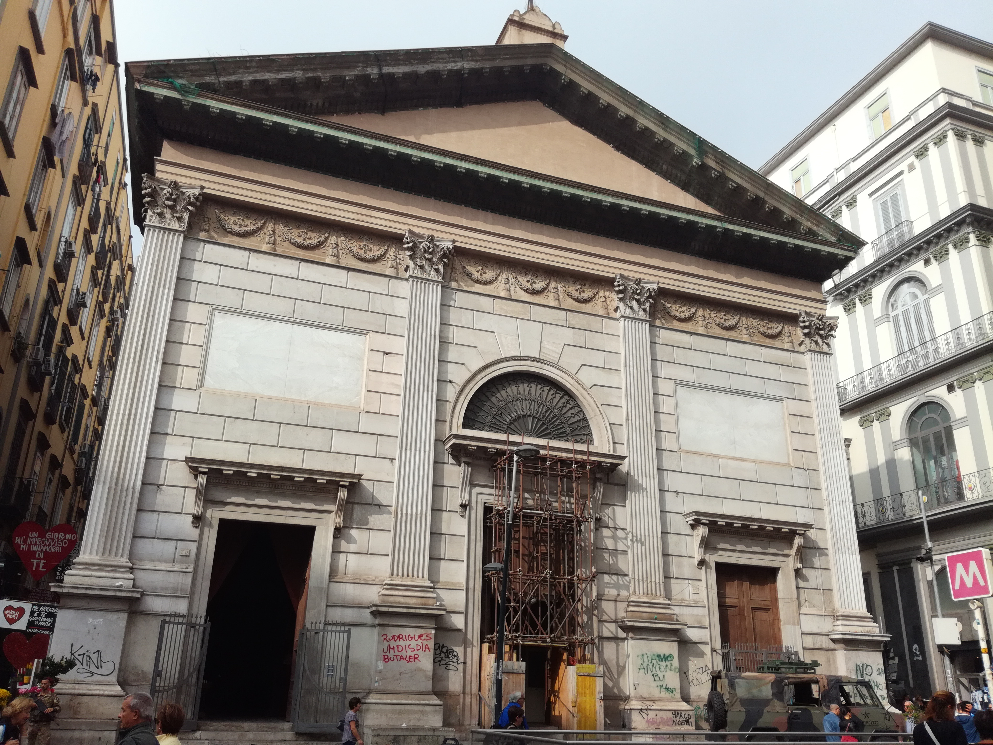 Facciata, Santa Maria delle Grazie a Toledo, Napoli